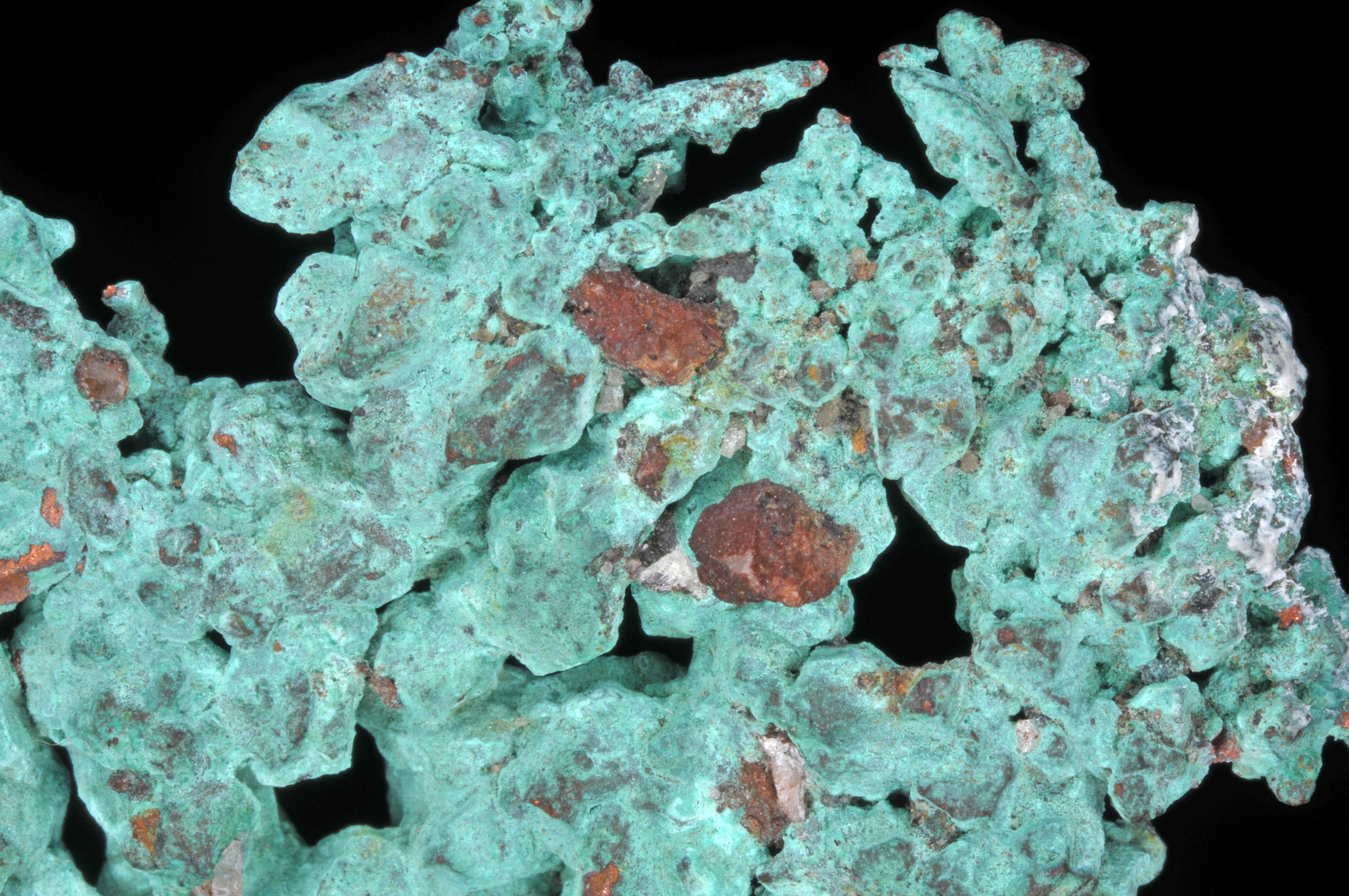 cristaux de cuivre natif : Oumjrane (Oumejrane, Oum-Jrana) Mine, Alnif, Tarhbalt, Er Rachidia Province, Meknès-Tafilalet Region, Morocco